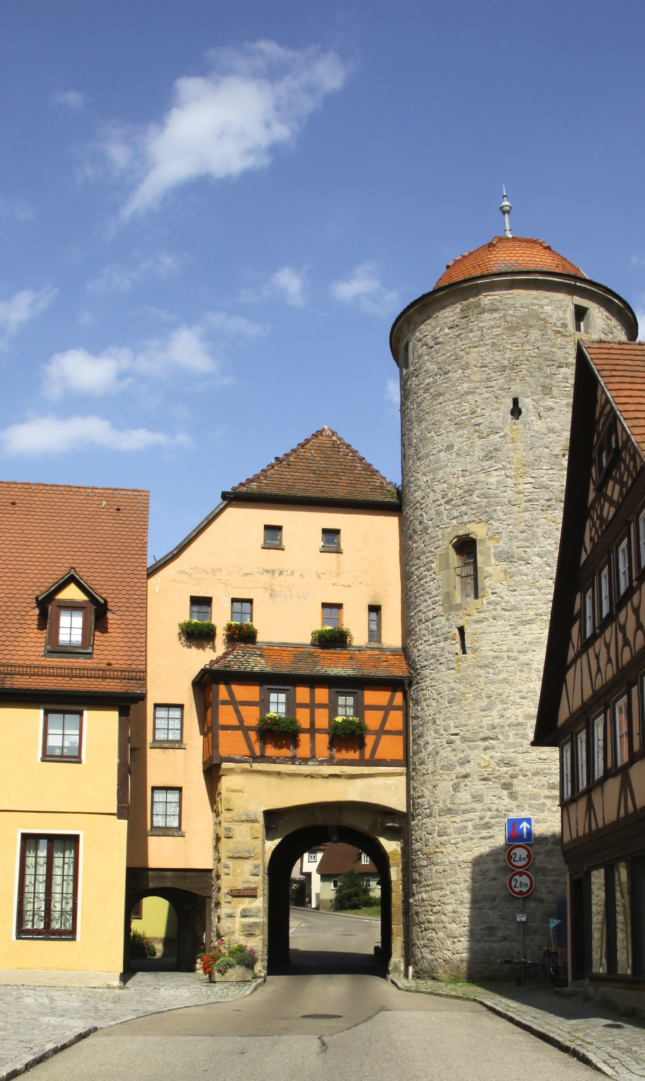 Langenburg–Stadttor (innerstädtische Seite)